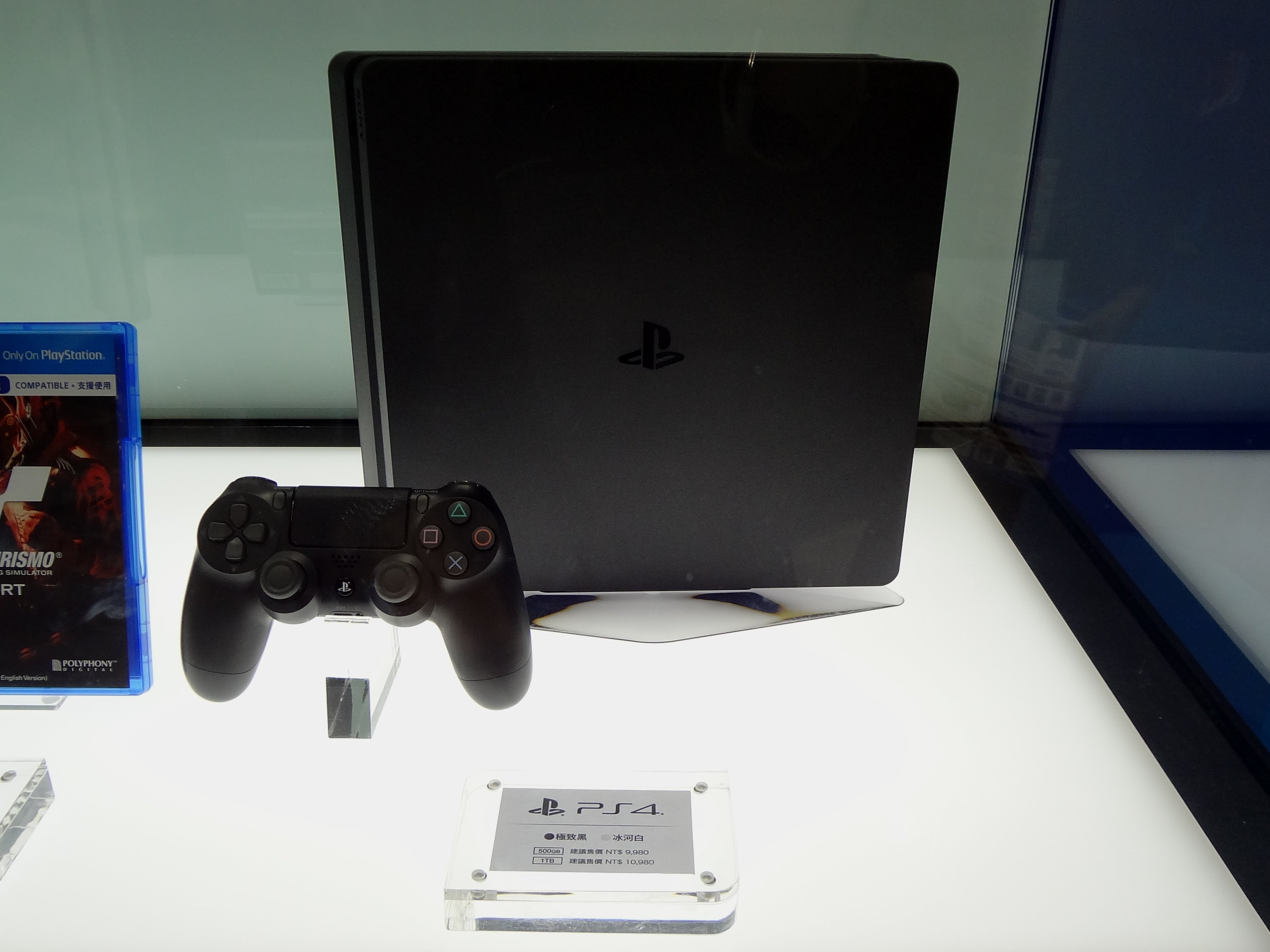 2017年台北資訊月，台灣索尼攤位展示的PlayStation 4 Slim極致黑。